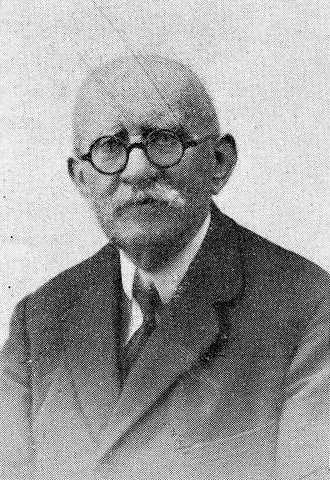 Juan Armada Losada, fotografía en Vida Gallega 1932